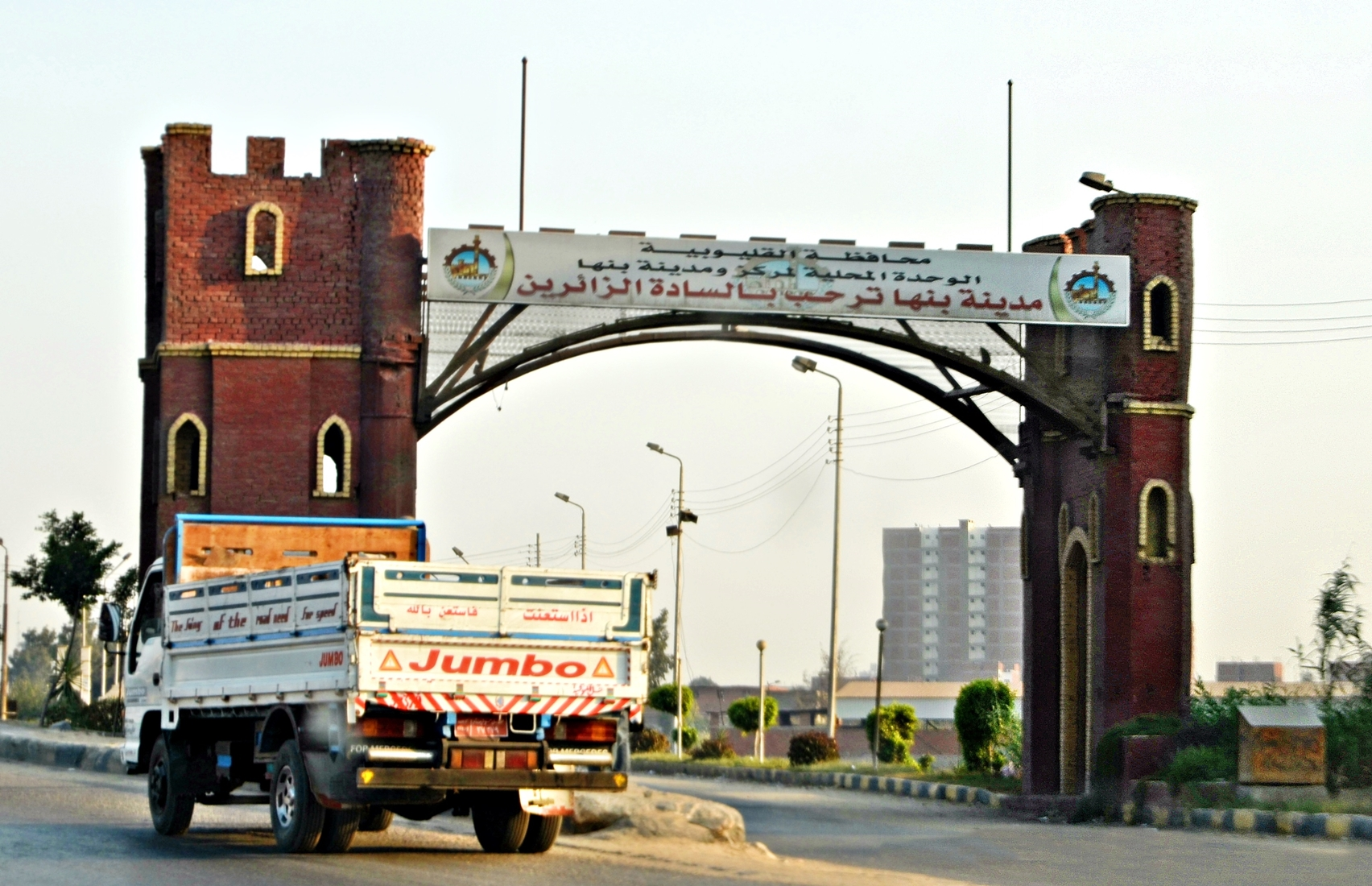 بوابة مدينة بنها، القليوبية، مصر